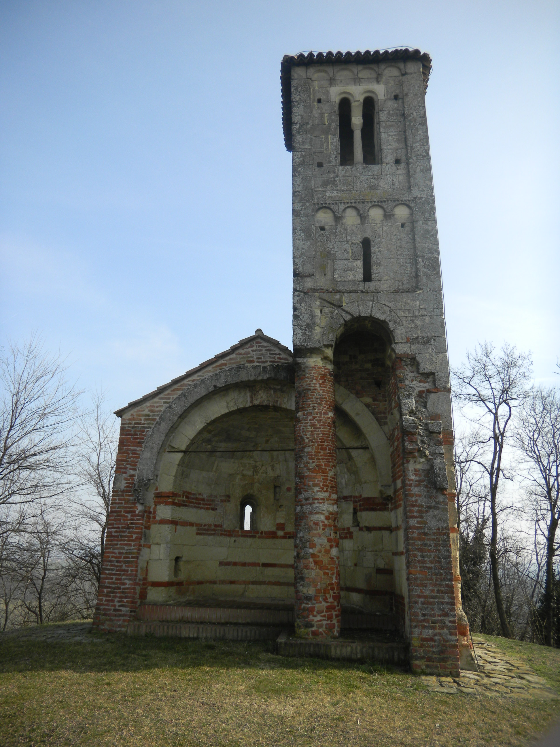 Montemagno (AT). Abside e campaniletto romanici di San Vittore.